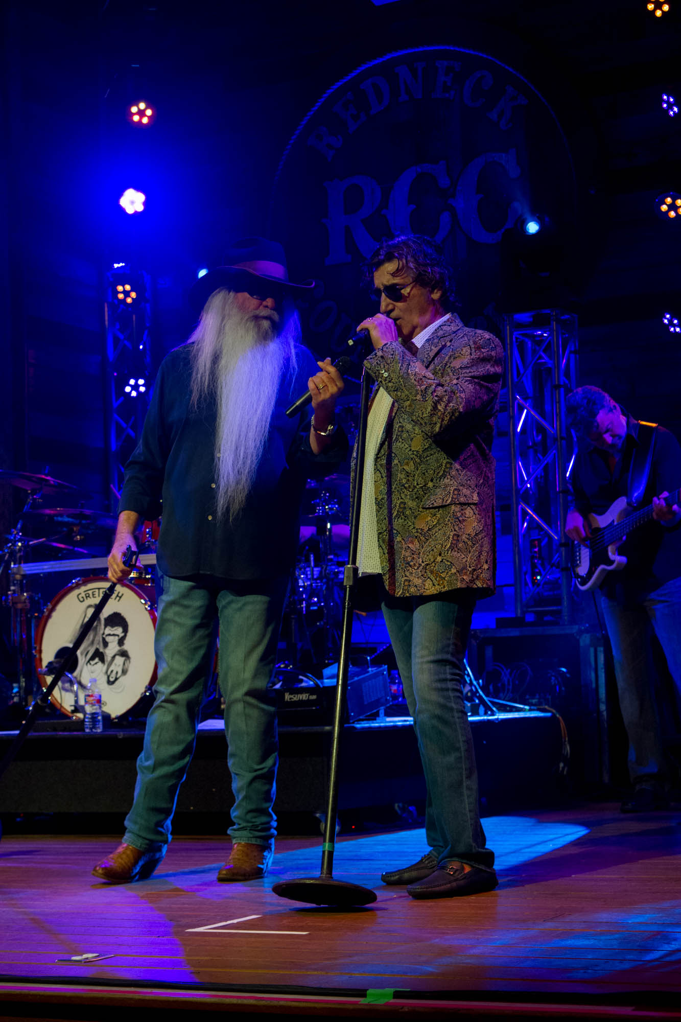 _MG_2049